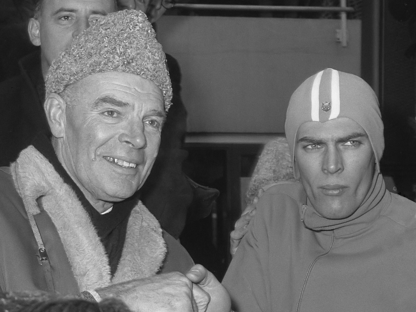 Europese Schaatskampioenschappen te Deventer, Ard Schenk en vader Klaas Schenk 23 januari 1966